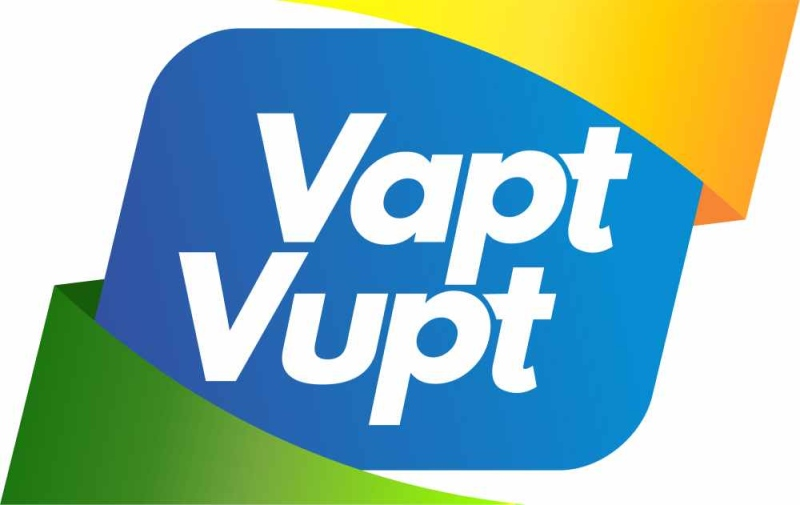 Goias_VaptVupt